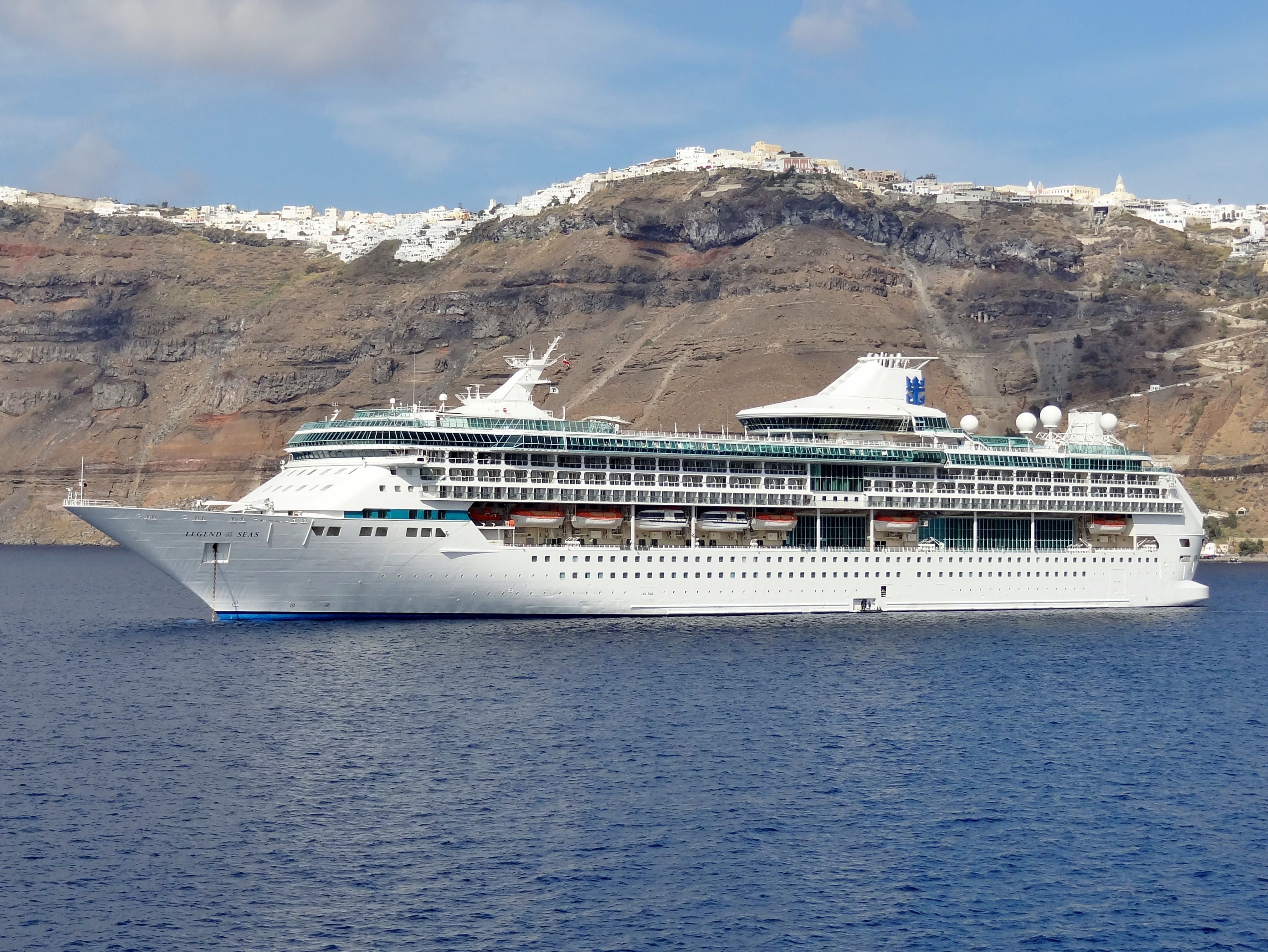 Die Legend of the Seas vor Fira auf Santorin, Kykladen, Griechenland